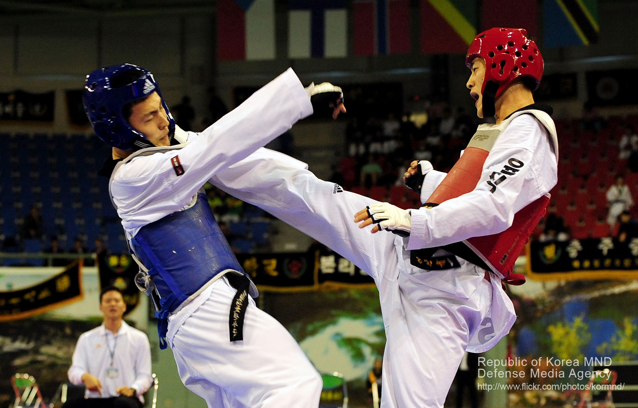 국방부와 대한태권도협회가 공동으로 주최하는 제21회 국방부 장관기 태권도대회가 18일 강원도 태백시 고원실내체육관에서 개최됐다. 박성규 육군제1야전군사령관 주관으로 열리는 이번 대회에는 중/고등부를 비롯해 대학부, 일반부, 군 7개 팀 등 3000여명이 참가해 오는 25일까지 8일간 태백시를 뜨겁게 달군다. 촬영 김태형 기자